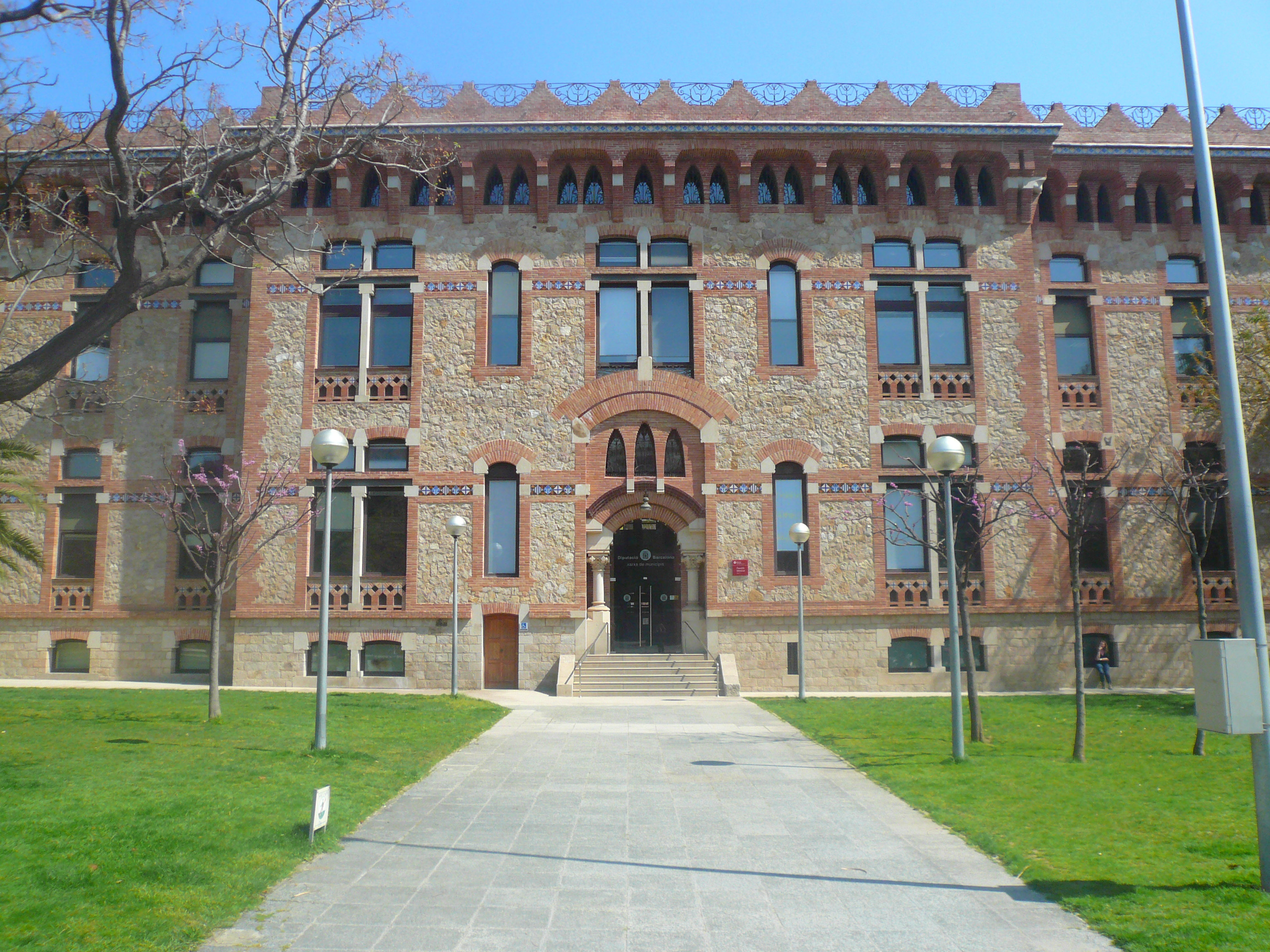 Casa provincial de la Maternitat. Trav. Corts, 131-159 - c/ Doctor Salvador Cardenal, 2-6 - av. Joan XXIII , 18-24 - c/ Maternitat, 2-30 - c/ Mejía Lequerica, 1-33 - c/ Sabino Arana, 21-25 (Barcelona). Object location41° 23′ 06.64″ N, 2° 07′ 23.79″ E